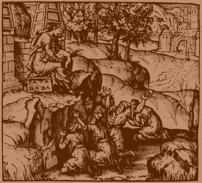 «Золотая баба». Гравюра из «Всемирной космографии» (La cosmographie universelle) Андре Тевэ 1575 г.